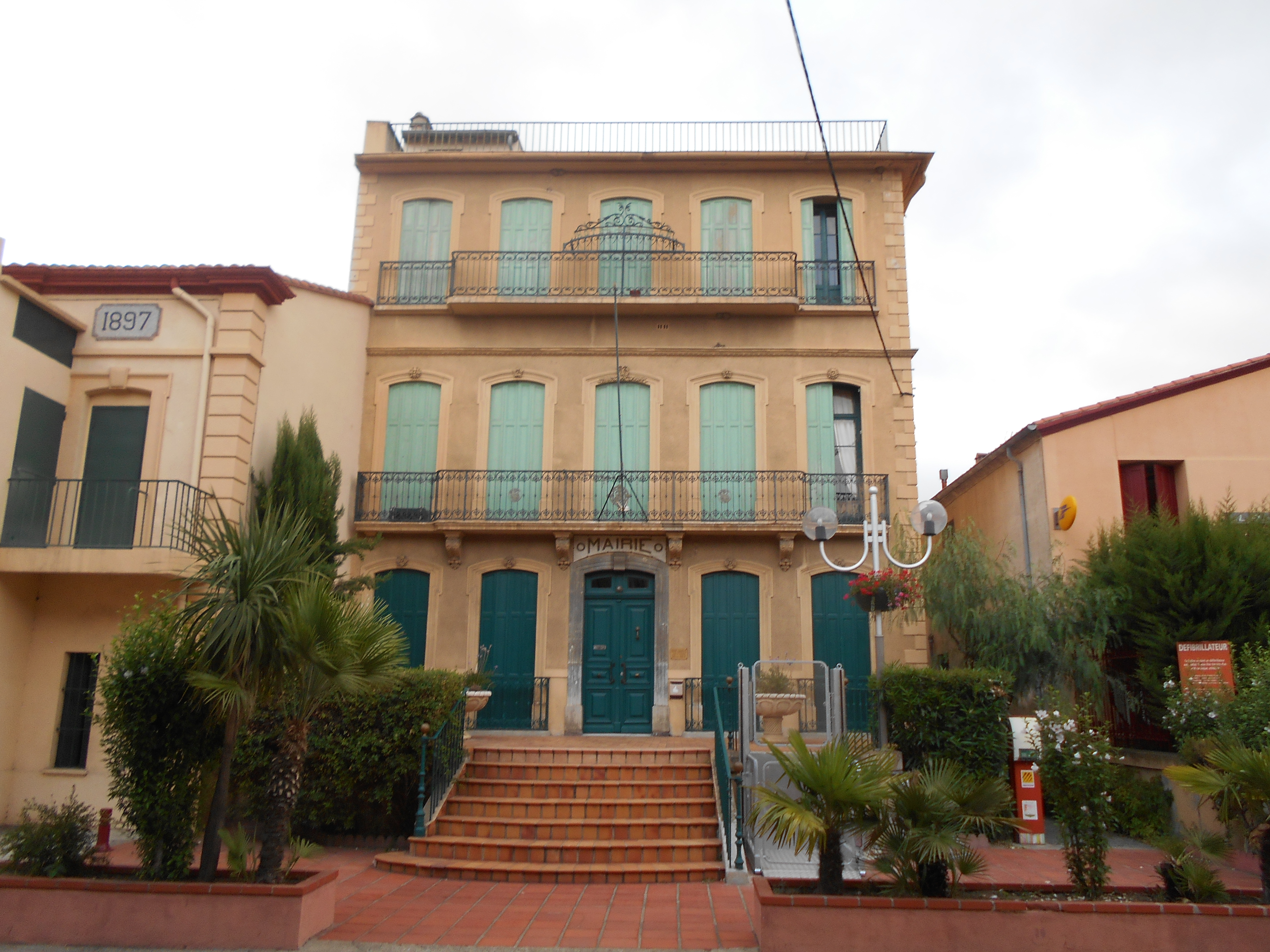 Casa del Comú d'Estagell